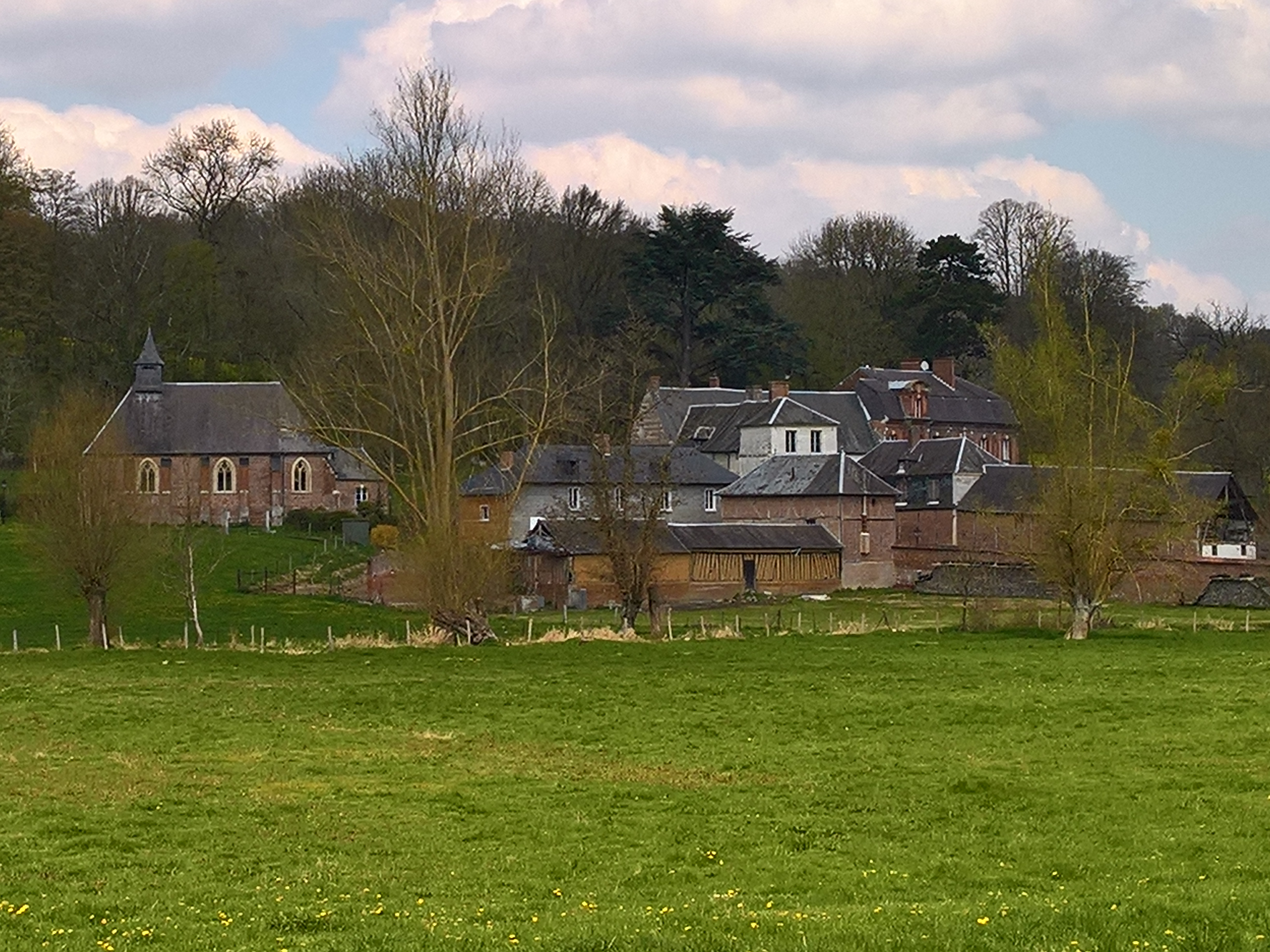 Poix de Picardie - Hameau de Saint-Romain, construit autour d'un moulin sur les Évoissons